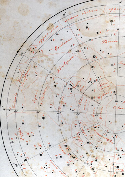 Uranografia Nova. Atlas